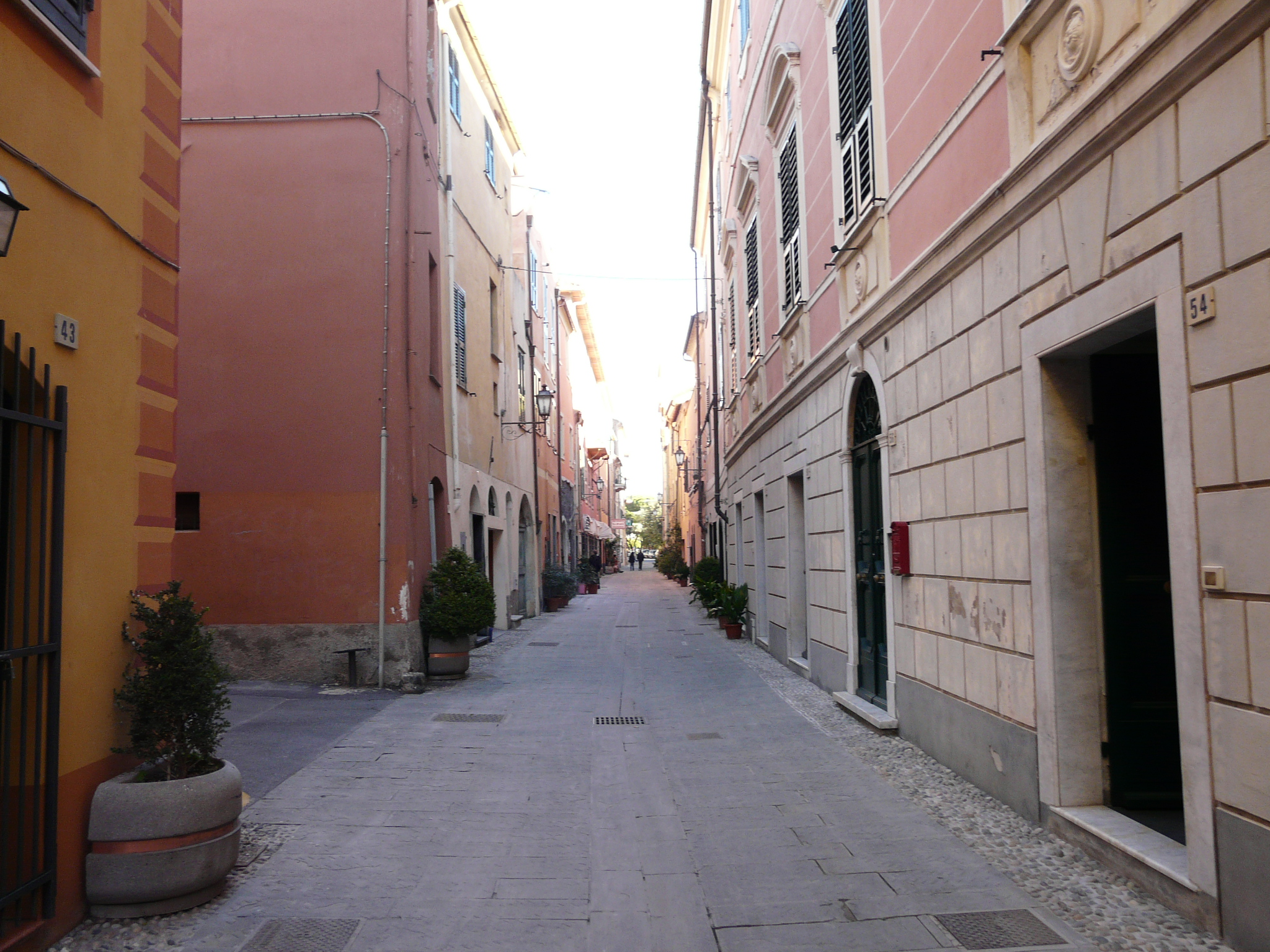 Centro storico di Ceriale, Liguria, Italia